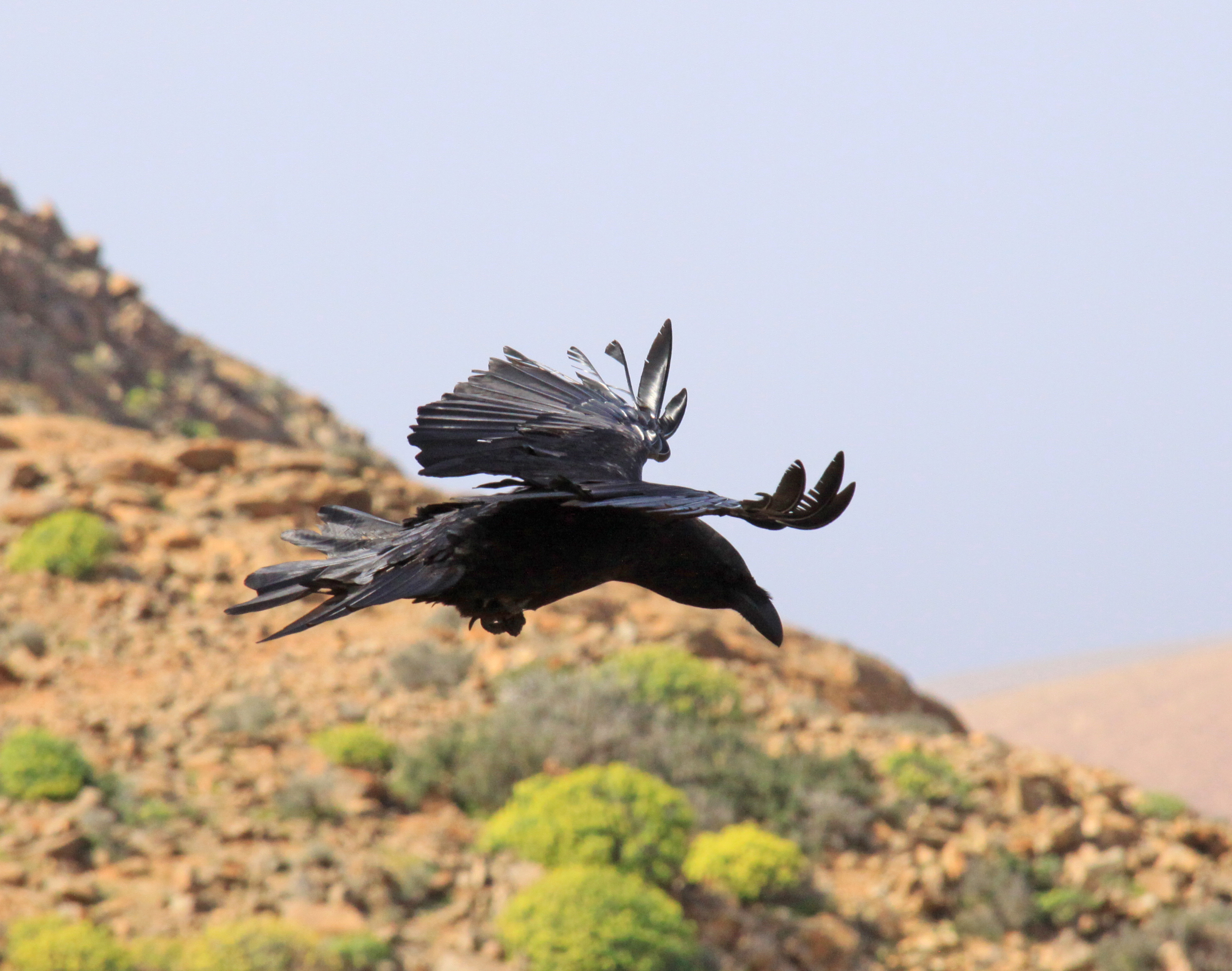 Raven 1